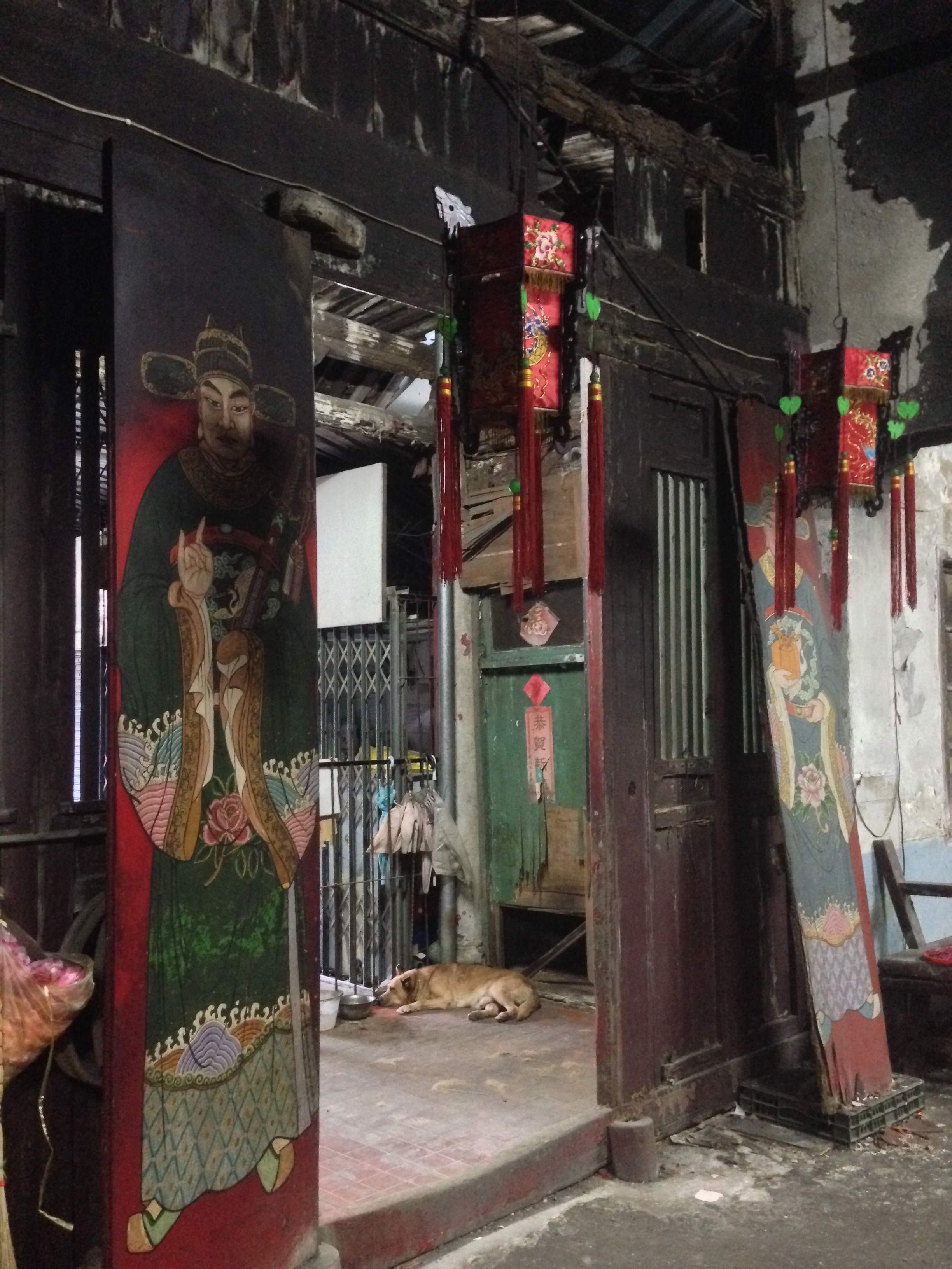 迪毅堂門神